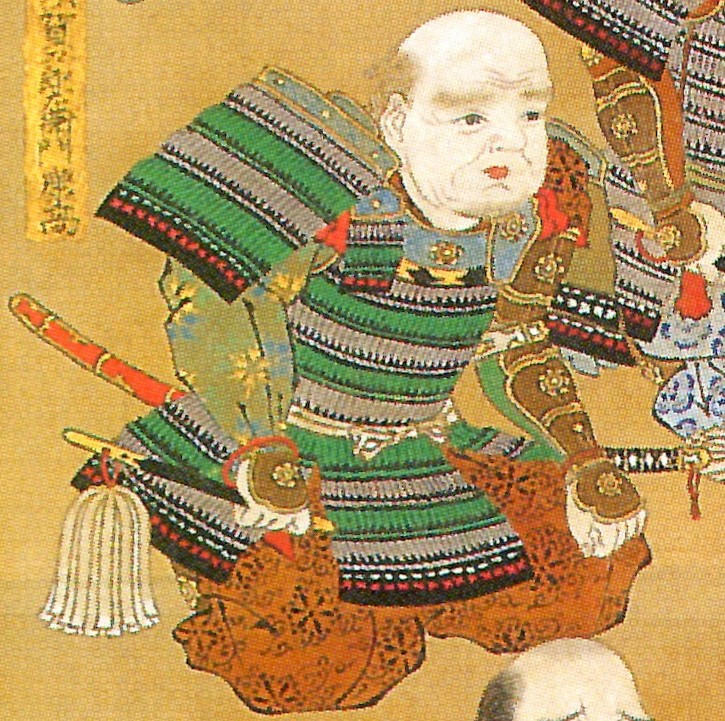 大須賀康高の肖像。